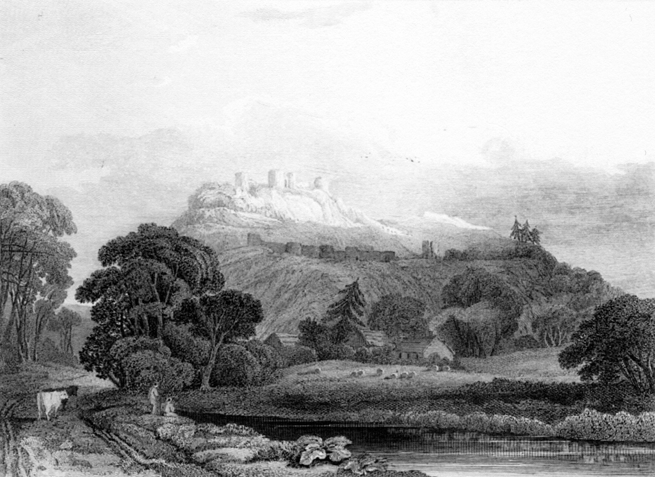 Engraving